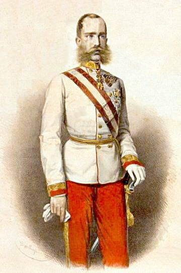 Ritratto di Francesco Giuseppe I d'Austria, ridotto, ritoccato, litografia